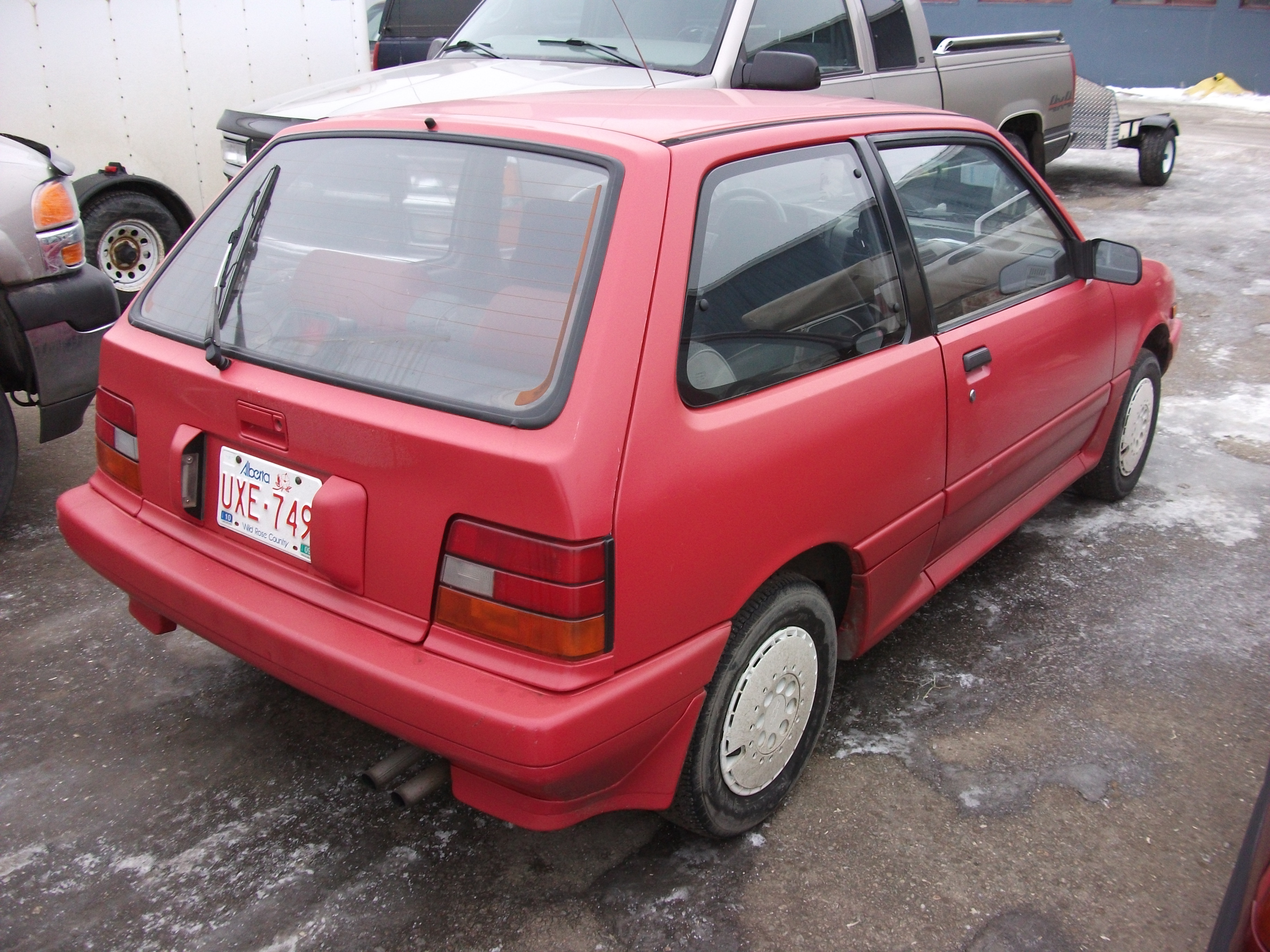 1987-1988 Chevrolet Sprint Turbo